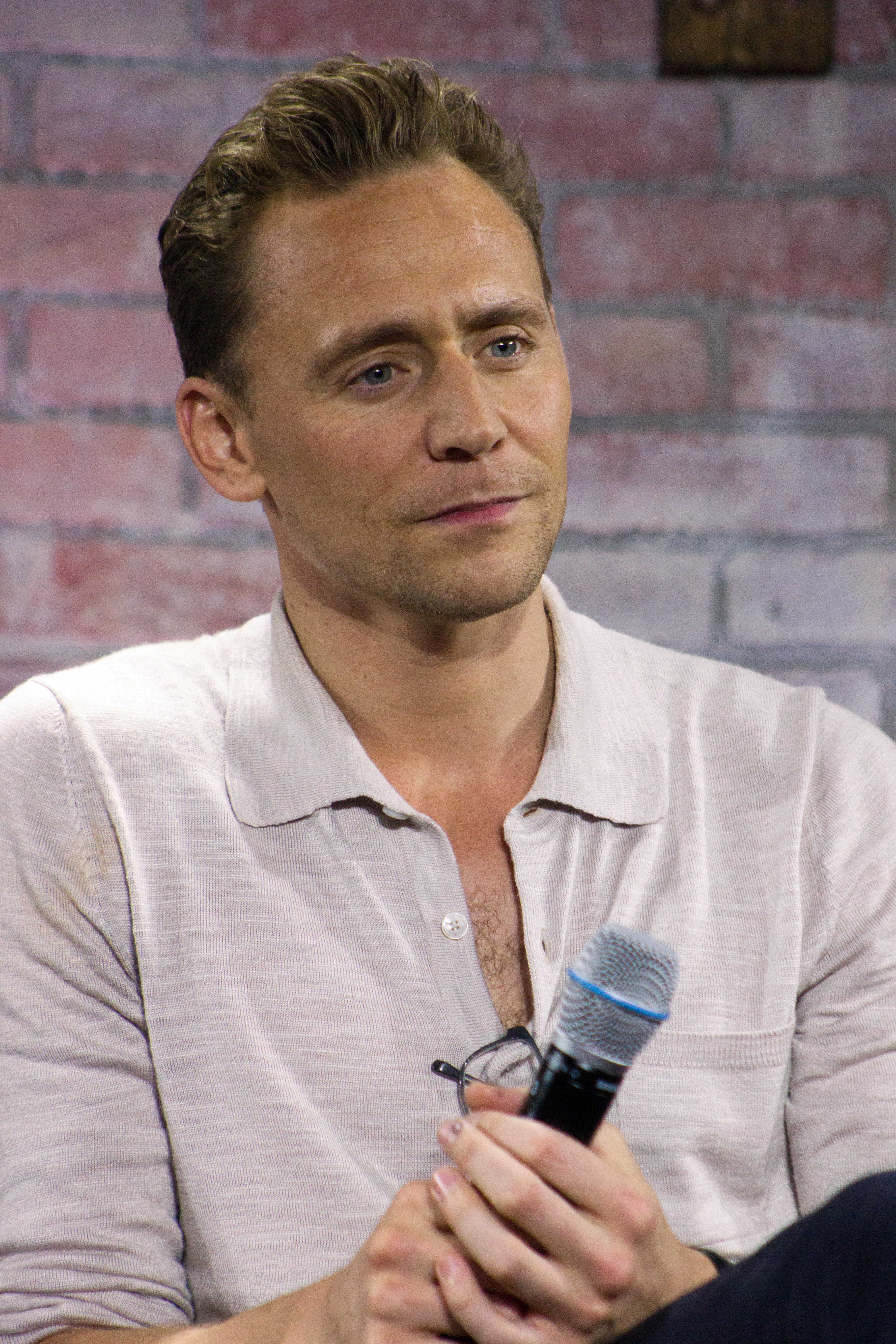 Tom Hiddleston